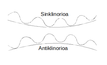 Toles sinklinorio eta antiklinorioa